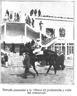 1916 hipodromoa lehentasun-tribuna